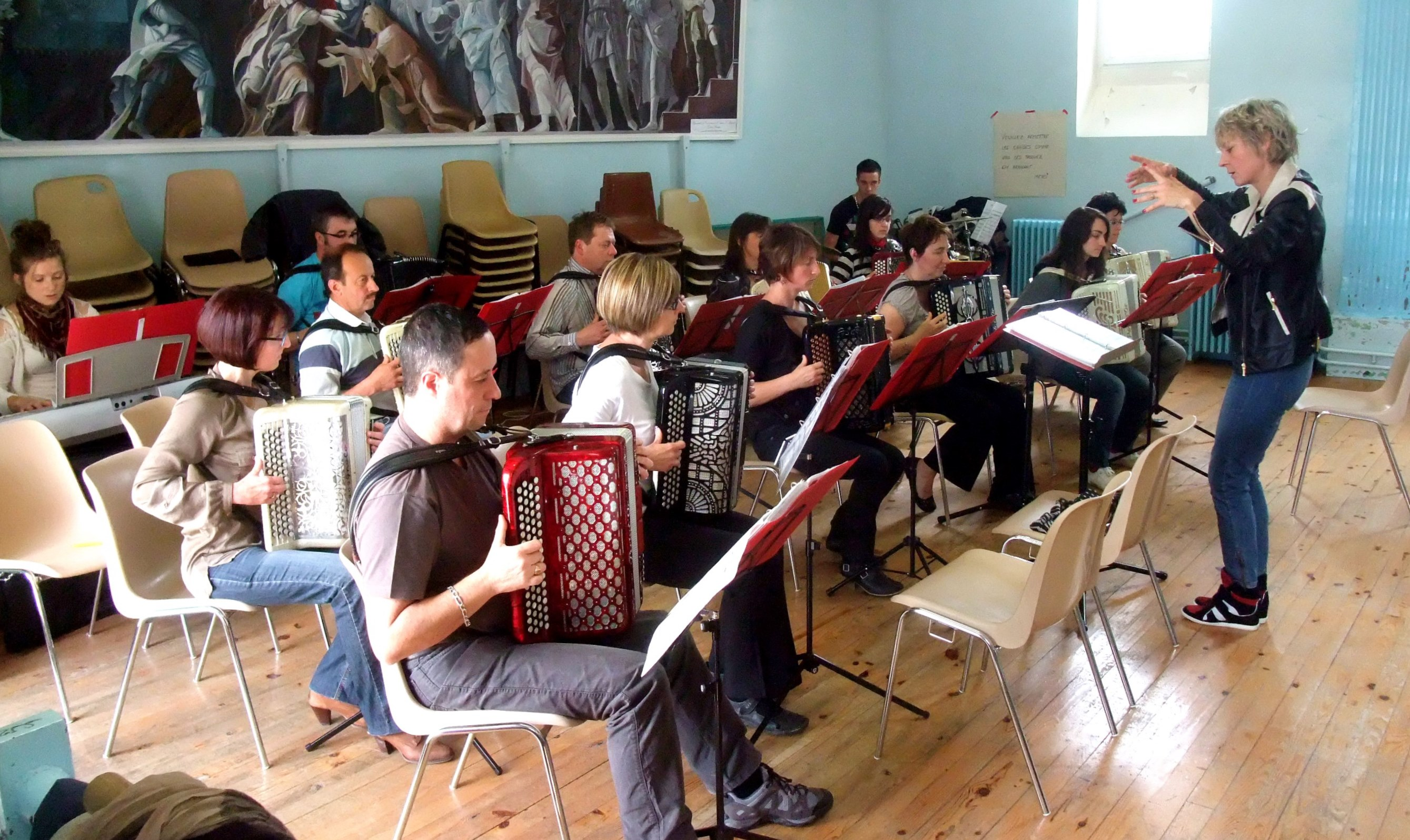 Boulieu accordéonistes